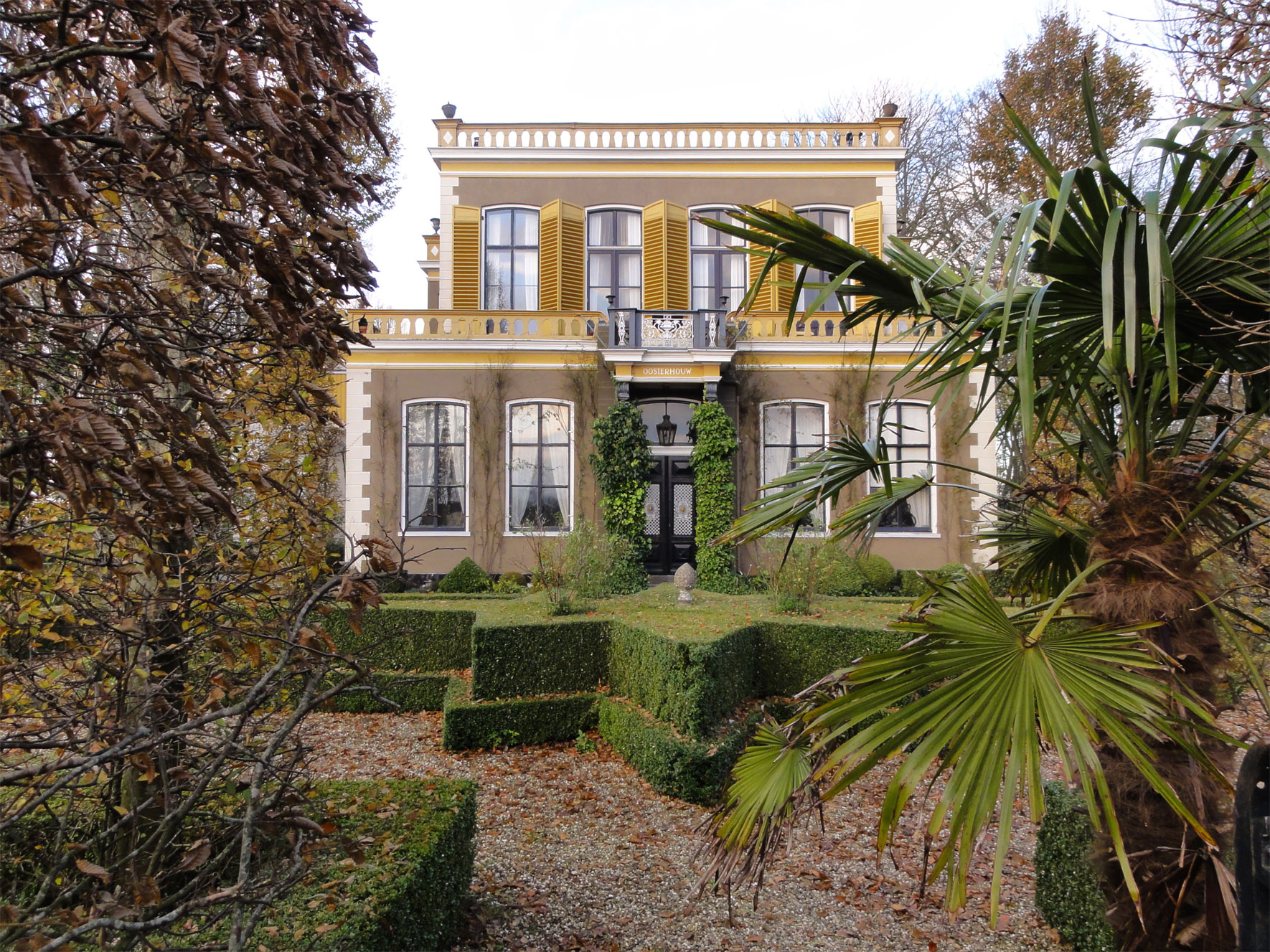 Oosterhouw Hoofdstraat 35 in Leens